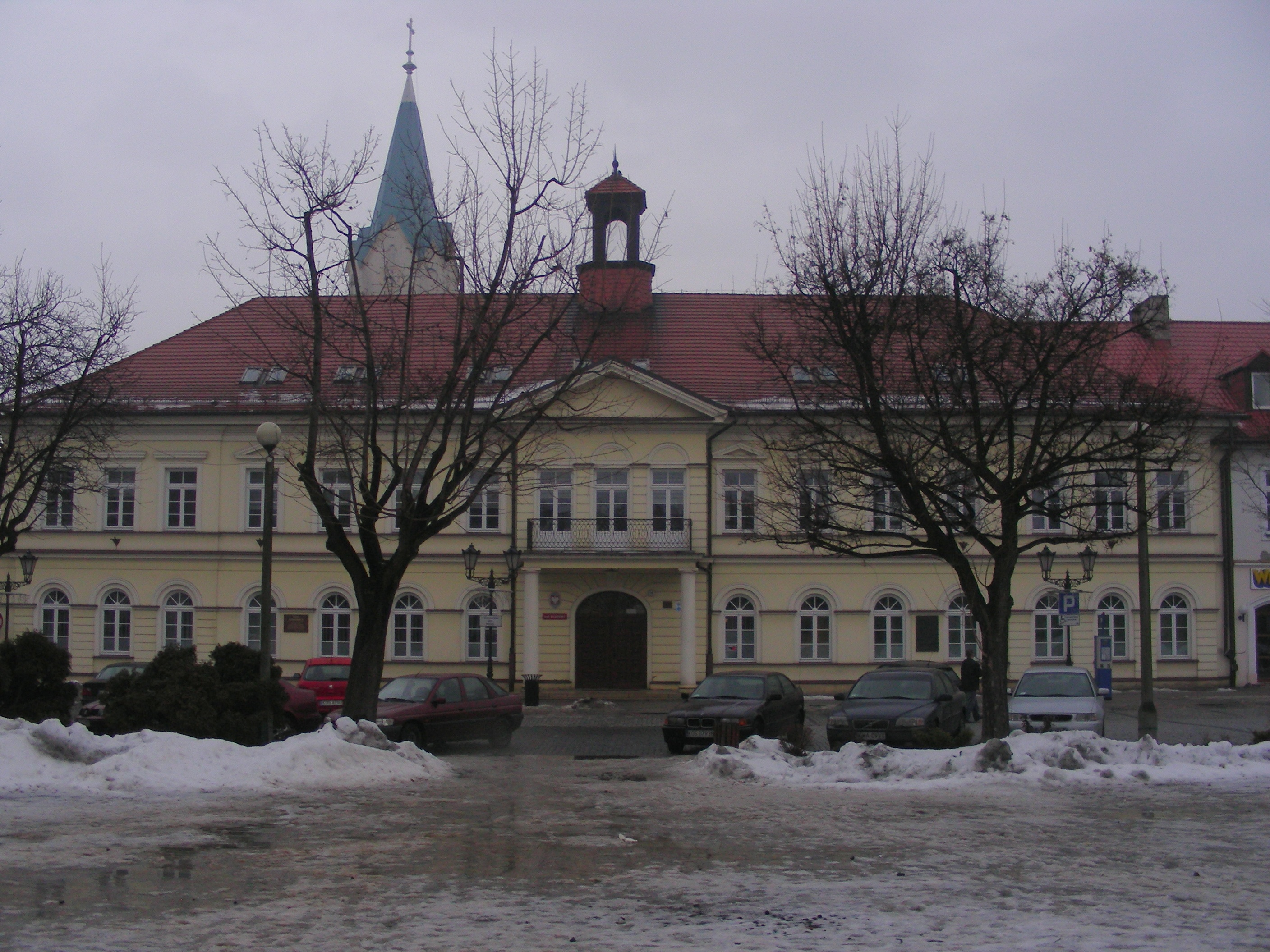 Kamienica Ślebarskich w Oświęcimiu